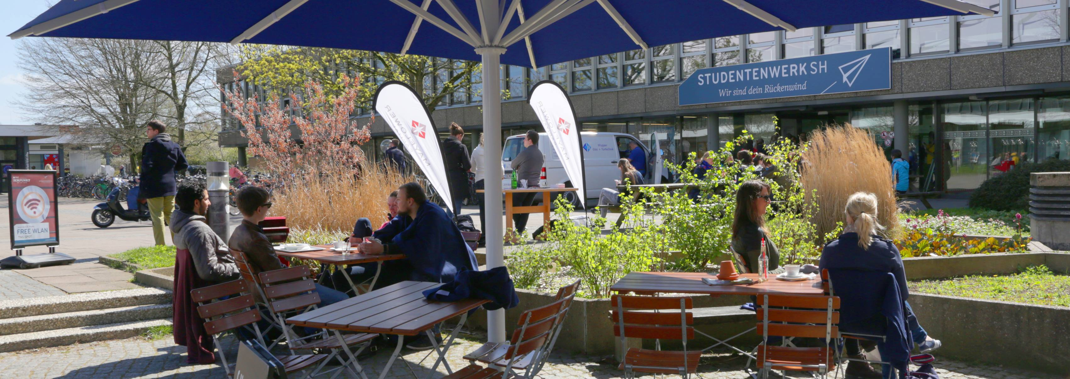 Abgebildet ist das Studentenhaus am Westring in Kiel des Studentenwerks Schleswig-Holstein, das unter anderem die Mensa I, das Amt für Ausbildungsföderung sowie das Kulturbüro beherbergt.